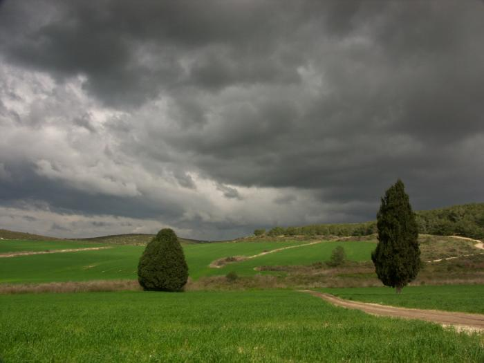 עננים באזור יער חורשן